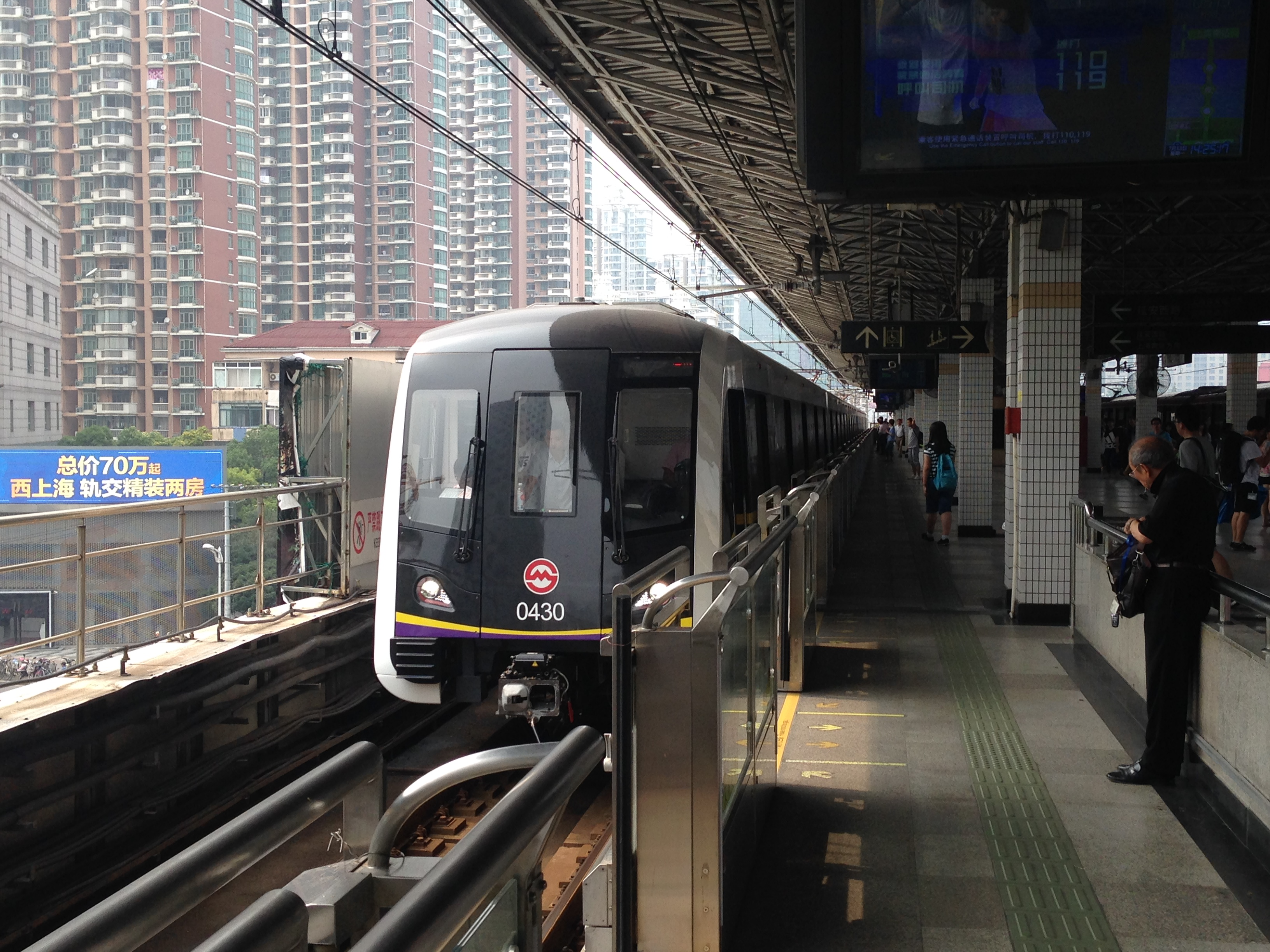 中文（中国大陆）: 4号线北车阿尔斯通列车在中山公园